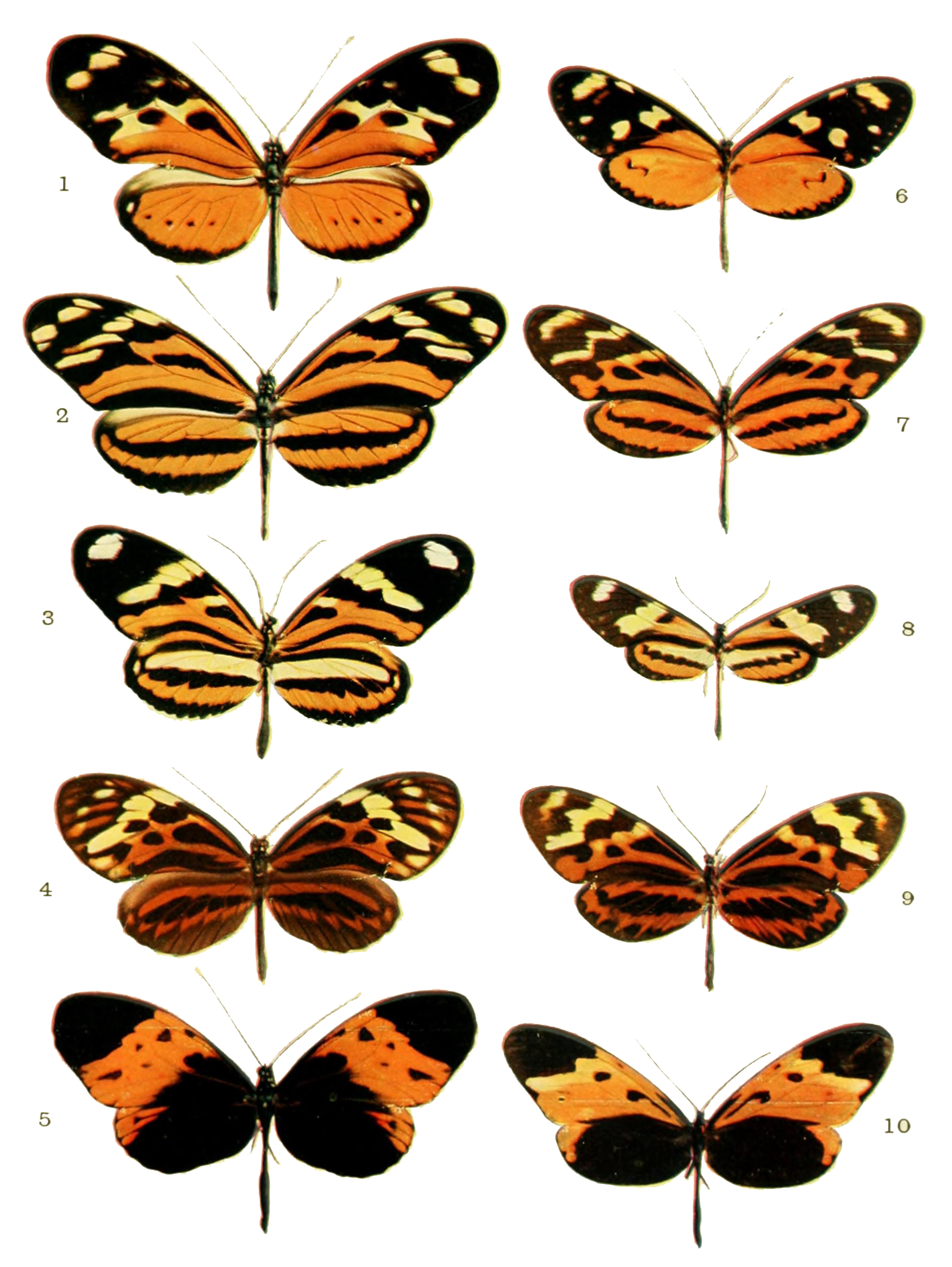 Borboletas das américas.